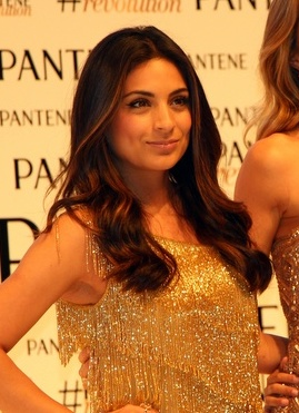 Embaixatrizes Pantene-004